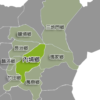 屏東縣內埔鄉相對位置。